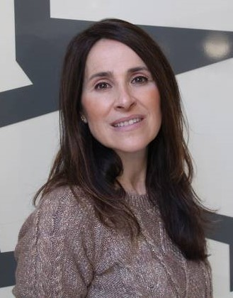 Bakartxo Tejeria 2017an, atzean Eusko Legebiltzarreko ikurrarekin